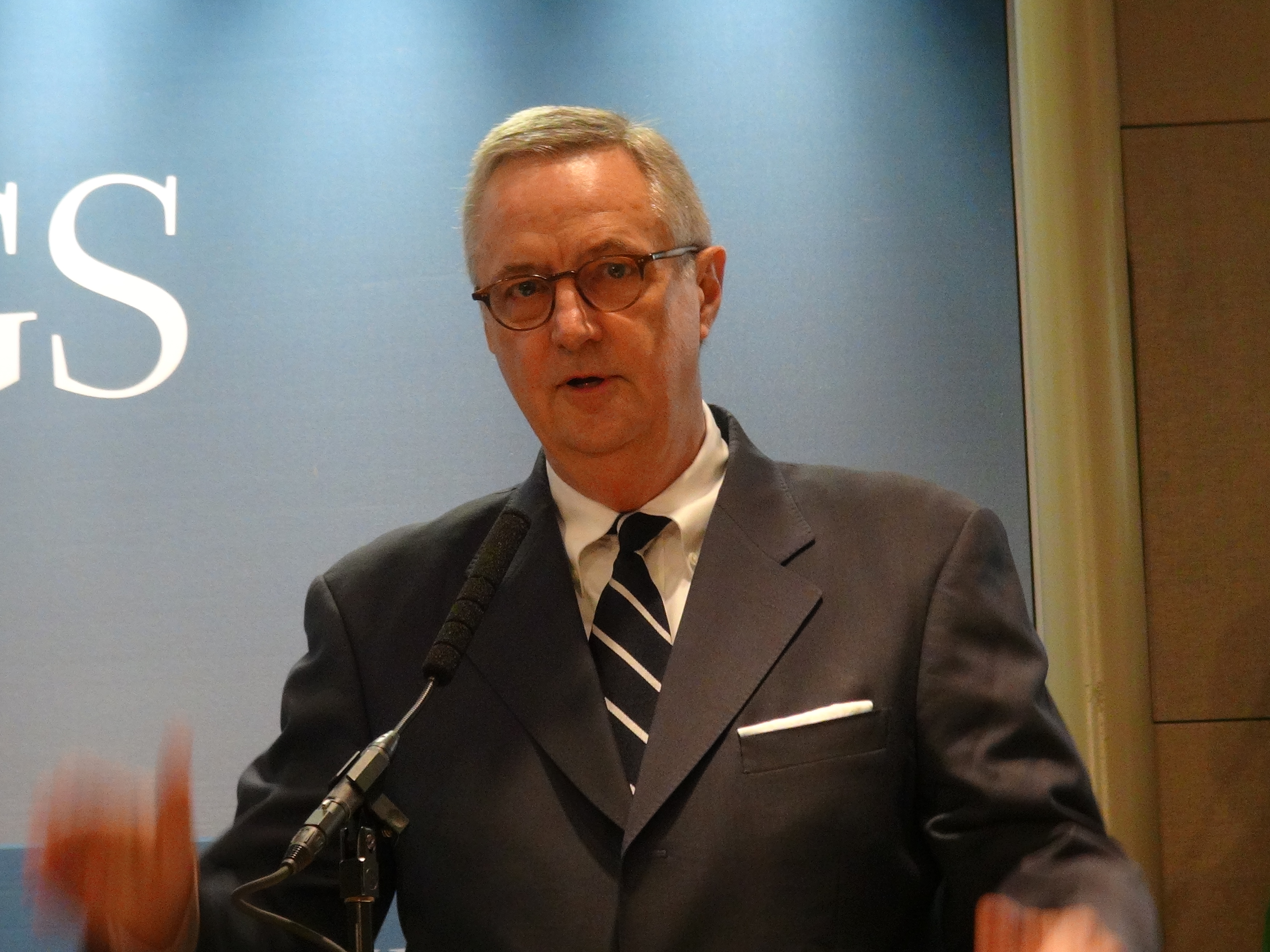 中文（台灣）: 喬治華盛頓大學政治學和國際關係教授沈大偉